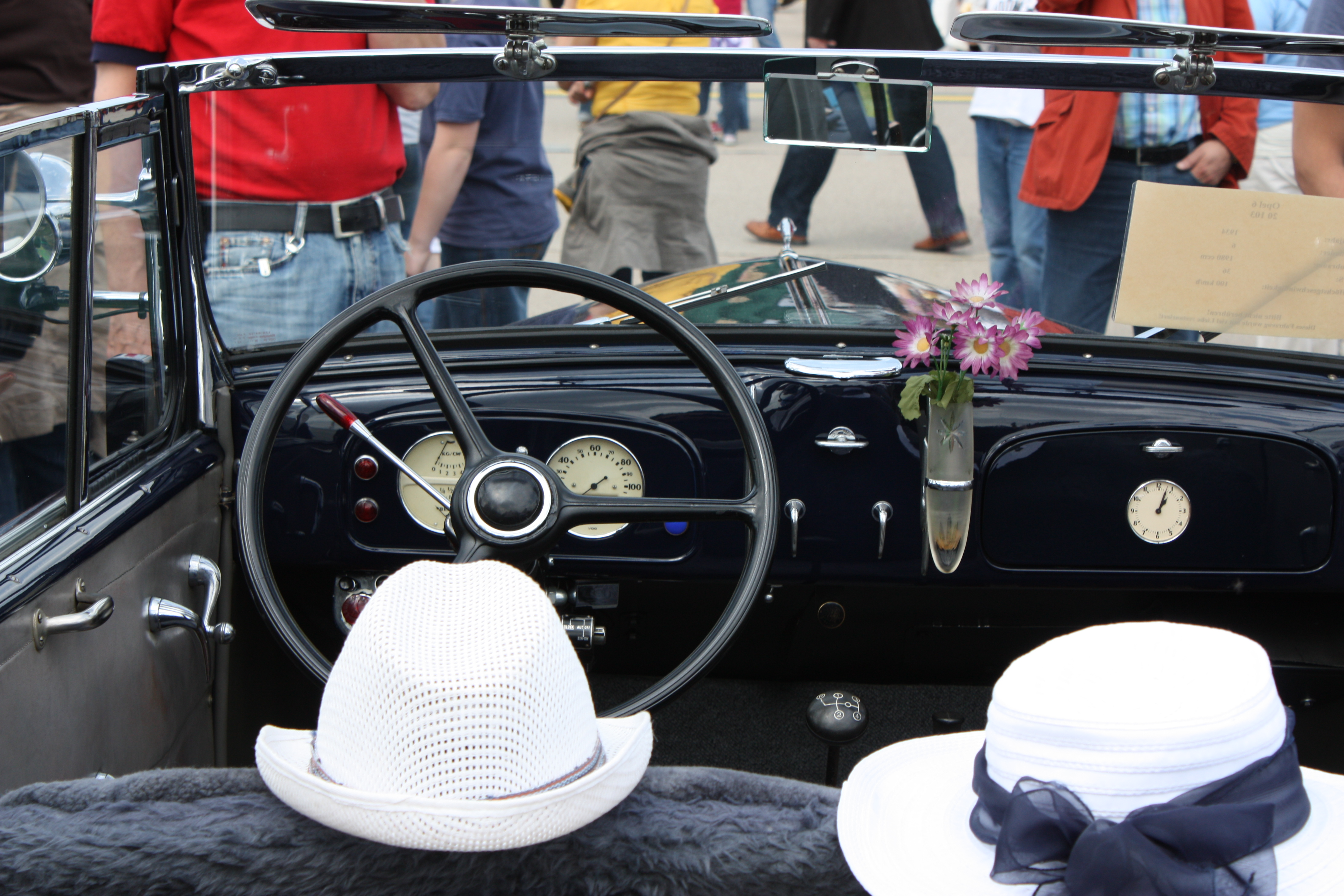 Vintage cars at Bremen Airport Flugtag 2009; Oldtimer